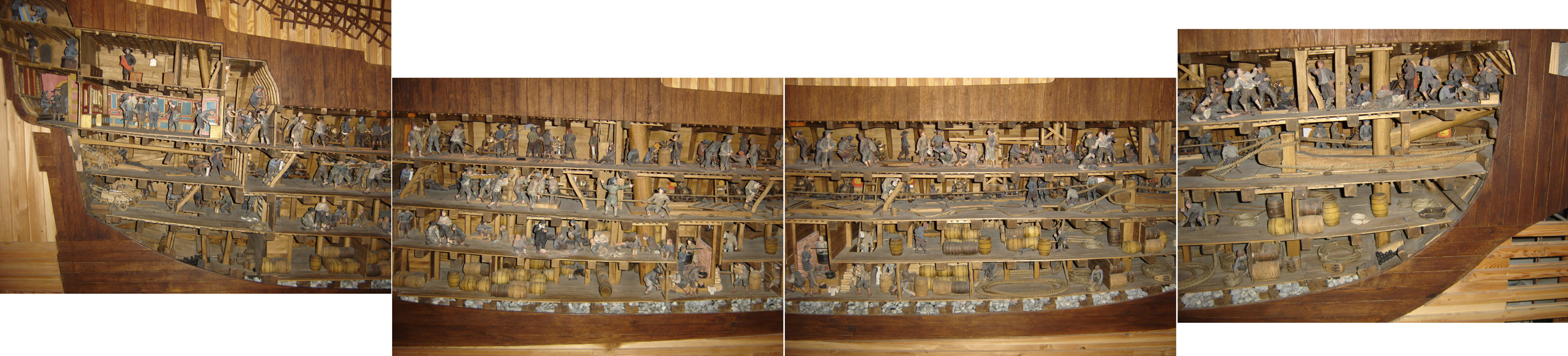 Reconstitution de l'intérieur originel du Vasa (montage de photos personnelles)